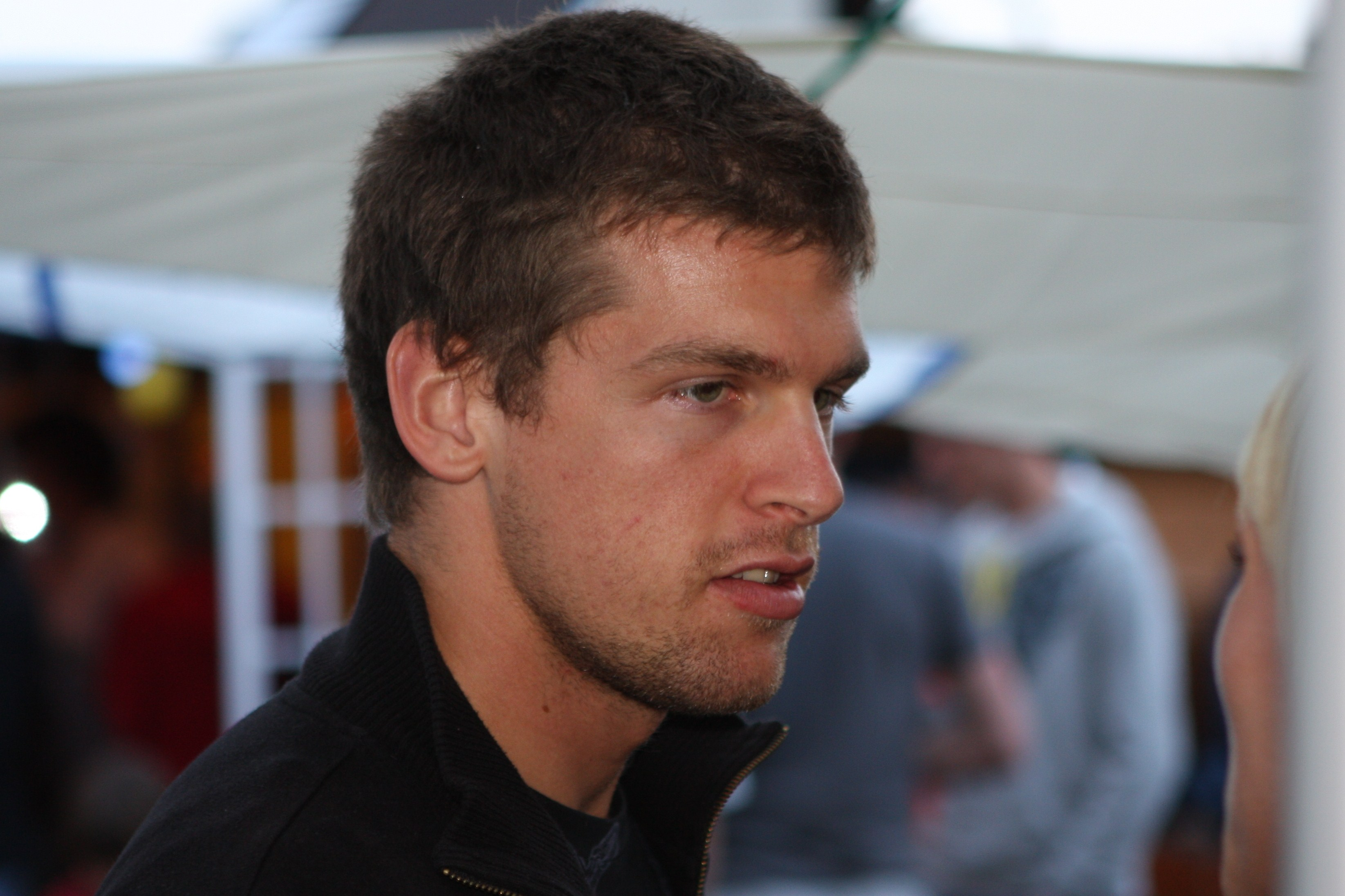 Martin Hess bei der Saisonabschlussfeier von Eintracht Frankfurt 2008